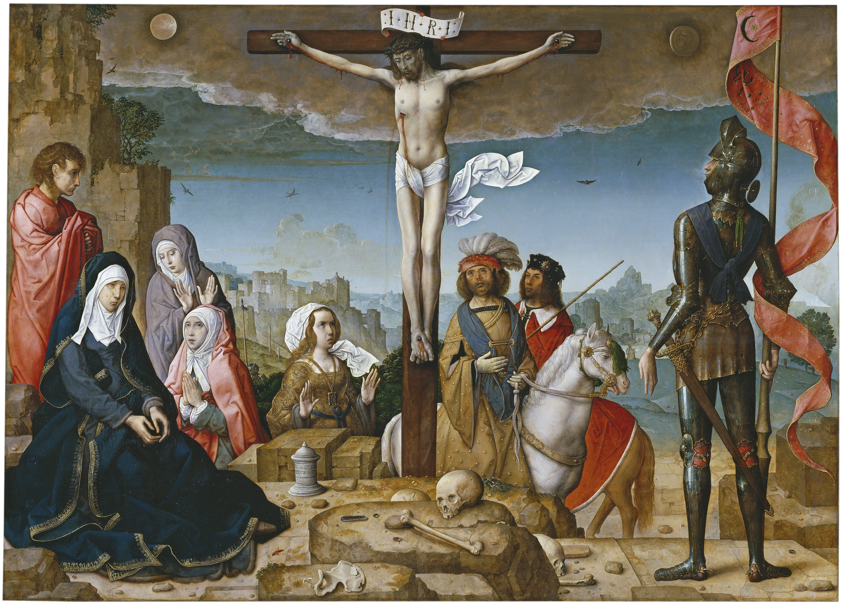 La obra representa a Jesucristo crucificado en el monte Calvario. Juan de Flandes concibe el espacio de esta Crucifixión con un punto de vista bajo, que evoca las composiciones de Mantegna y la dota de resonancias italianas, por el modo de disponer al los personajes con un dominio de líneas rectas que otorgan monumentalidad al conjunto. Para llamar la atención sobre Cristo Crucificado, situado en el centro, ante un fondo de paisaje, idea un semicírculo de figuras en torno a Él. A la originalidad del pintor flamenco al representar este tema iconográfico se suma su dominio técnico, patente en la forma de reproducir las calidades de las cosas como las piedras preciosas y el coral esparcidos por el suelo.